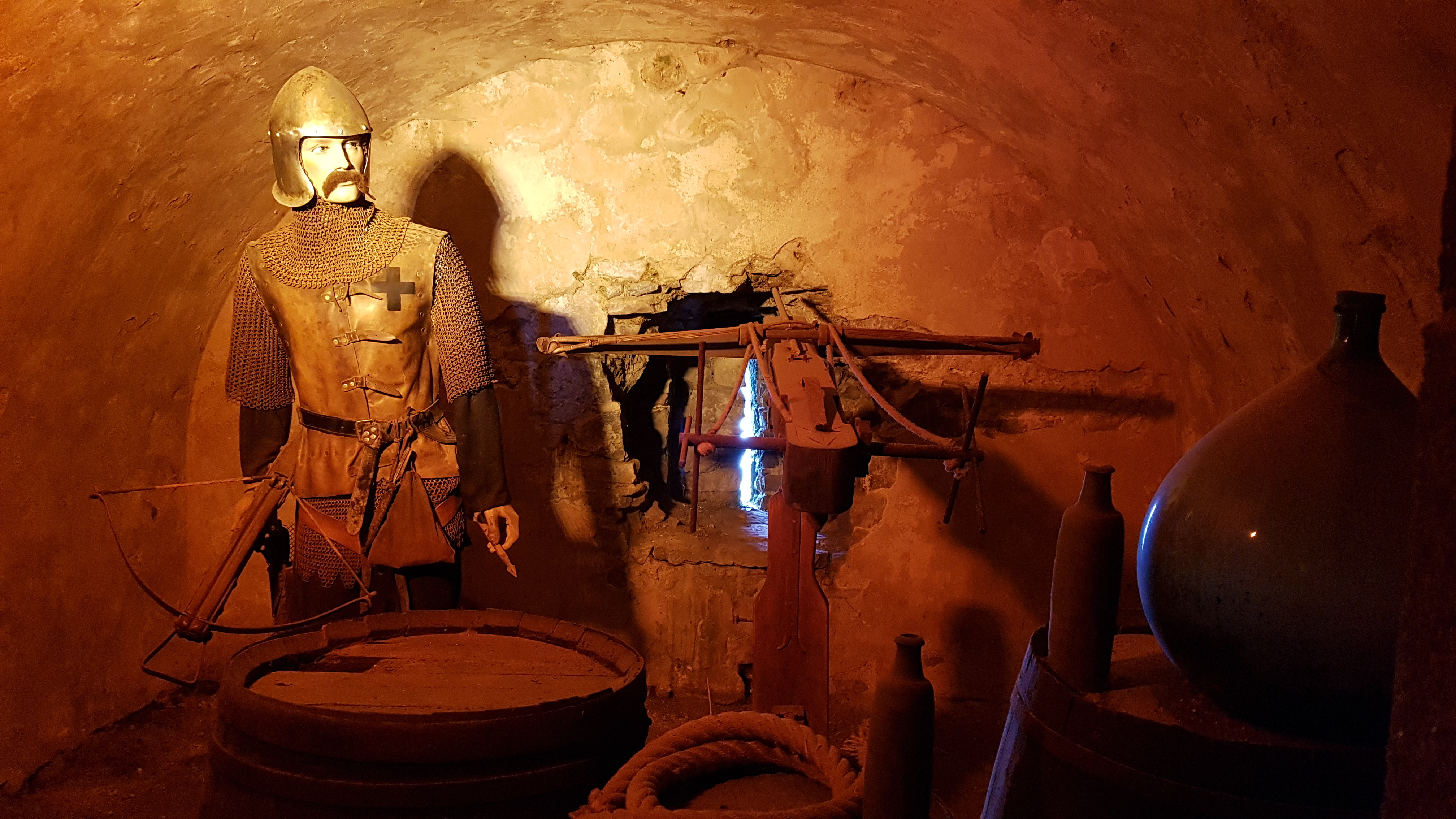 Fort la Latte - scène reconstituée dans le donjon